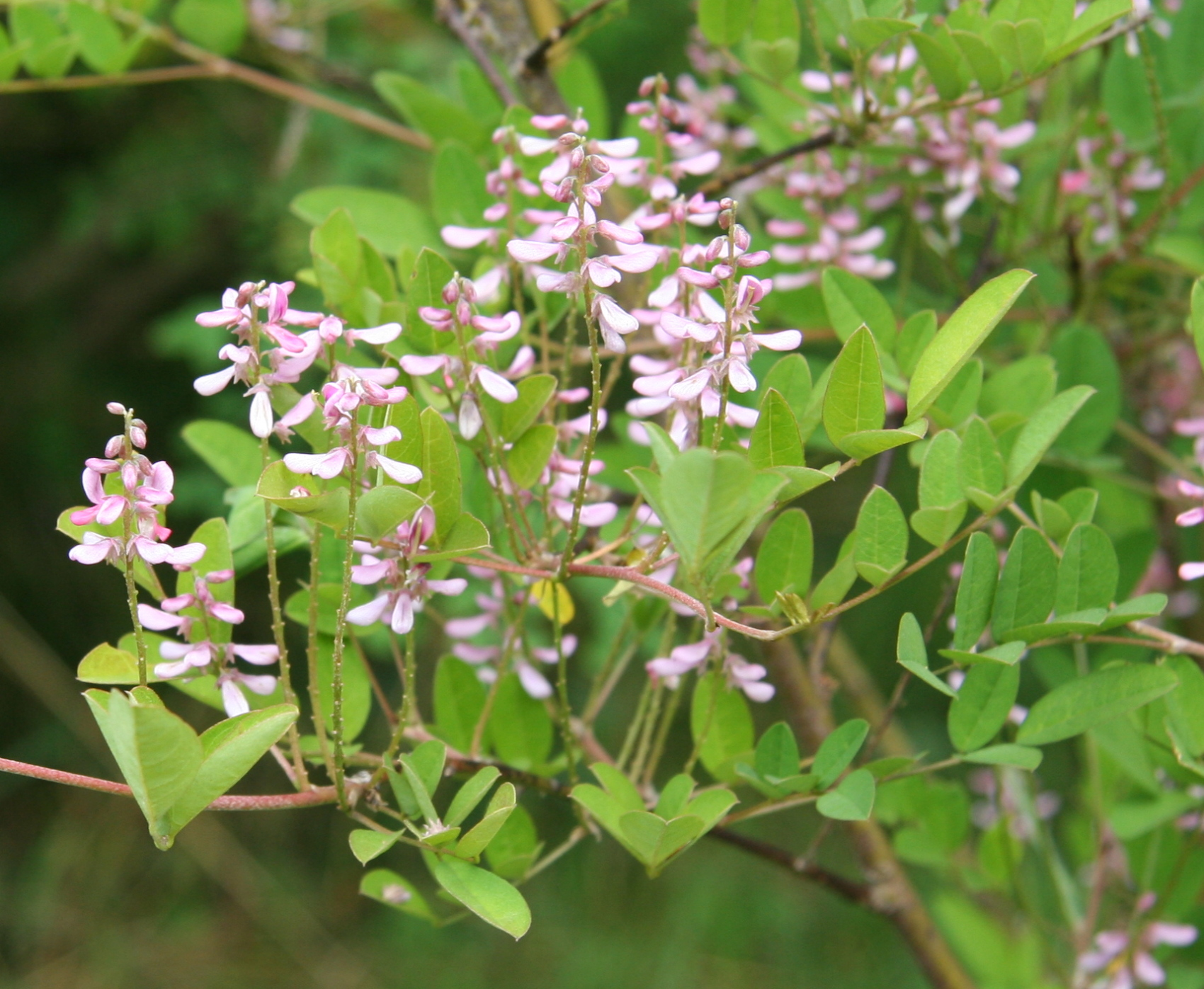 Indigofera potaninii im Botanischen Garten Dresden